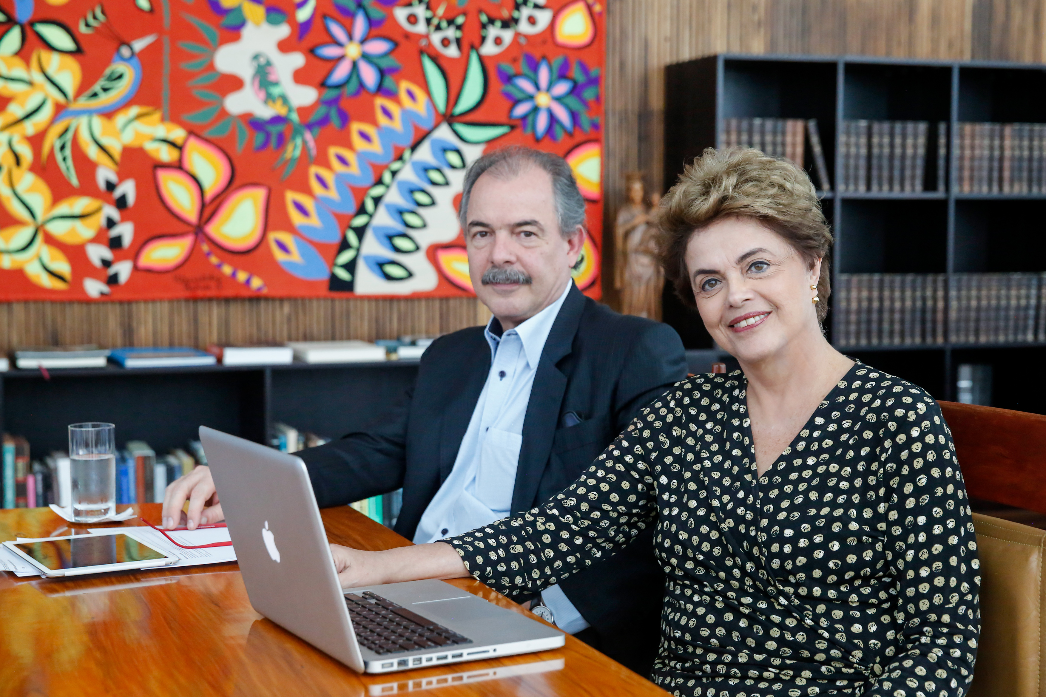 Presidenta Dilma Rousseff acompanhada do Ministro Aloizio Mercadante durante Face to Face no Palácio da Alvorada. (Brasília - DF, 25/05/2016) Foto: Roberto Stuckert Filho/PR